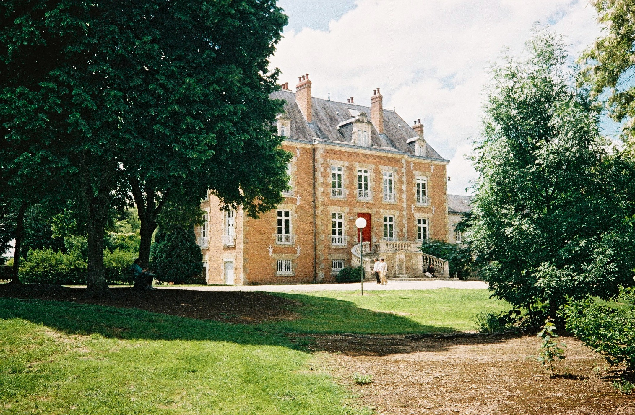 Chateau de Saint Cyr en Val, Loiret, France